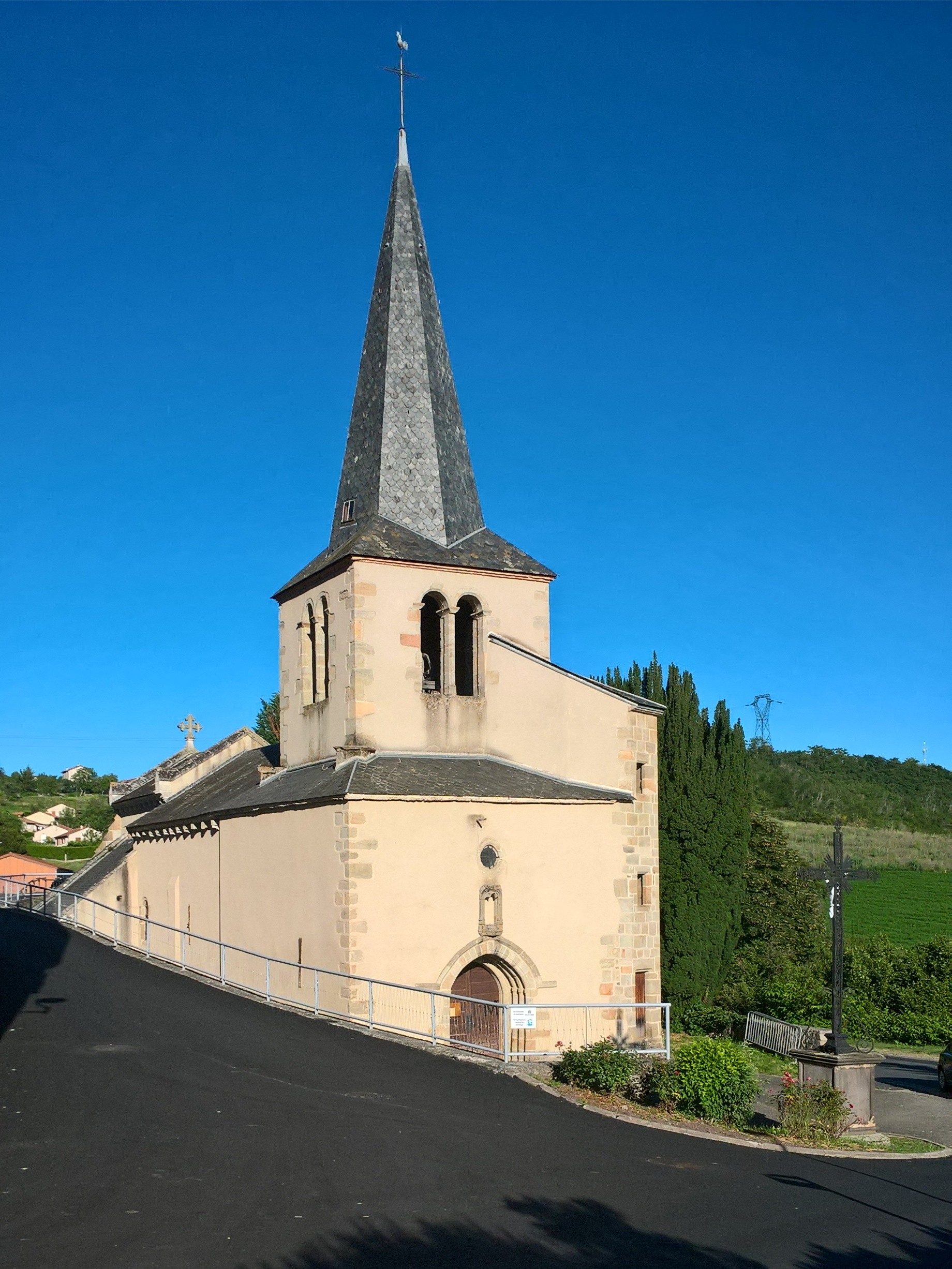 Orbeil, église.